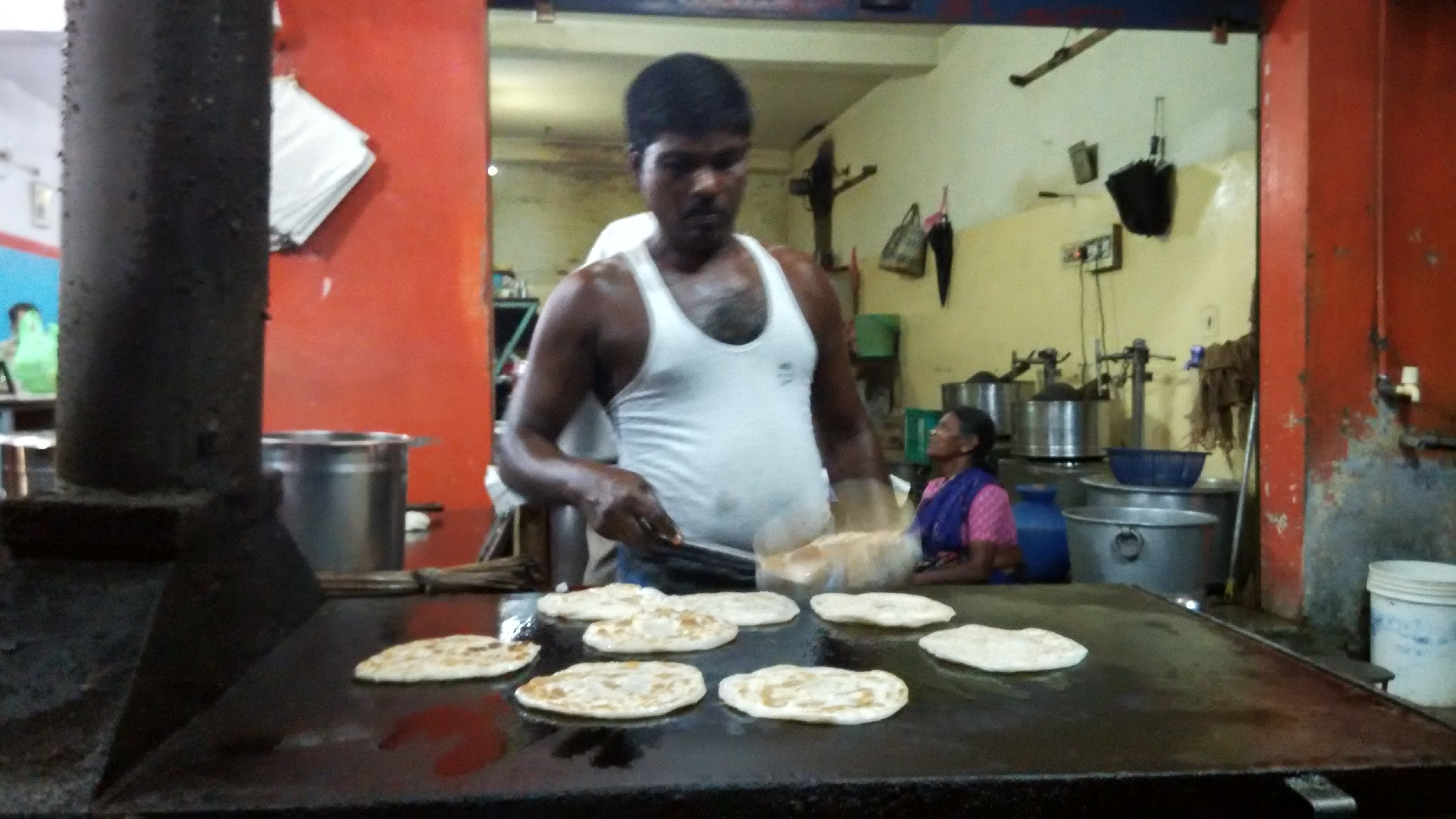 பரோட்டா உருவாக்கம்